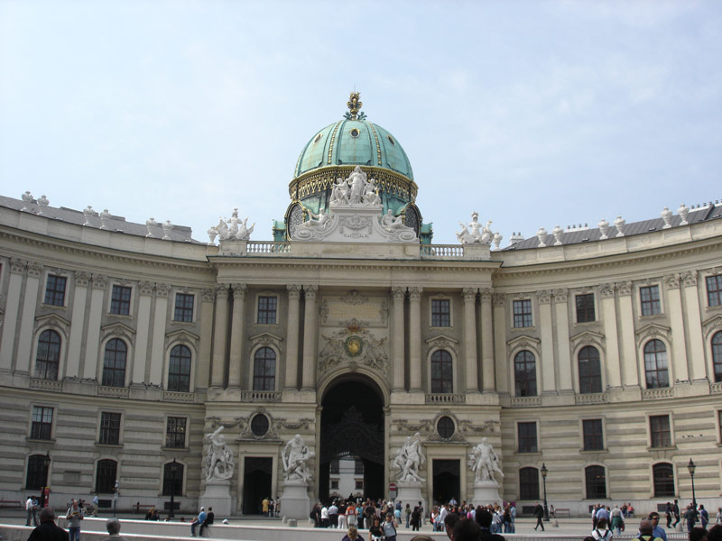 Hofburg, Vienna